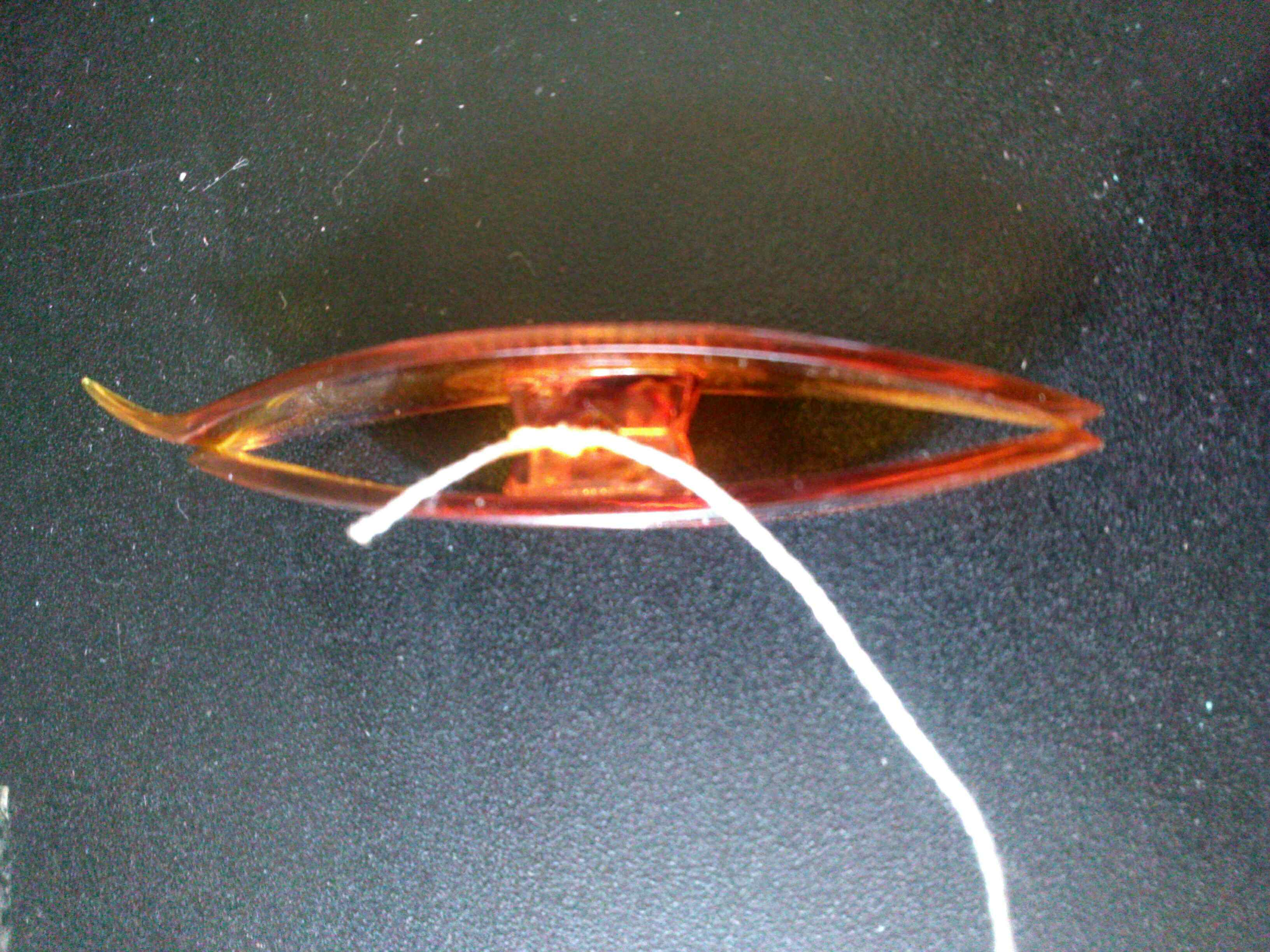 側面の穴に糸を通して結び、表面から見て反時計回りに巻いていく。